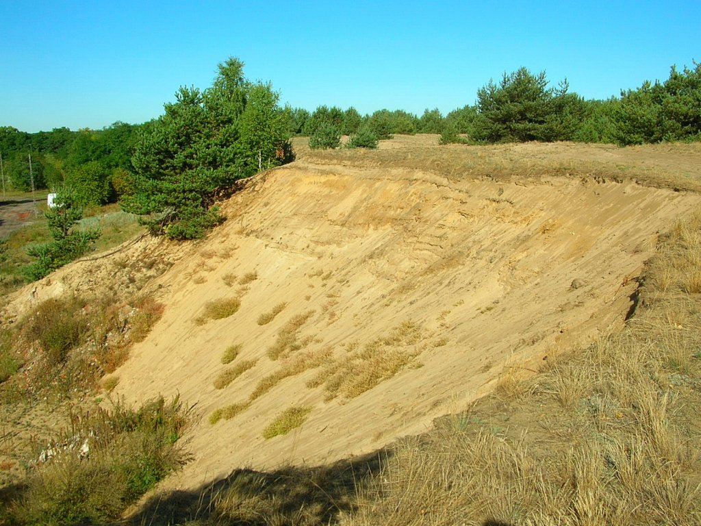 Krawędź terasy rzecznej doliny Brdy na Jachcicach w Bydgoszczy